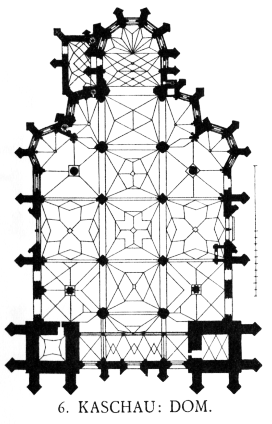 Kaschau/Košice, Dom